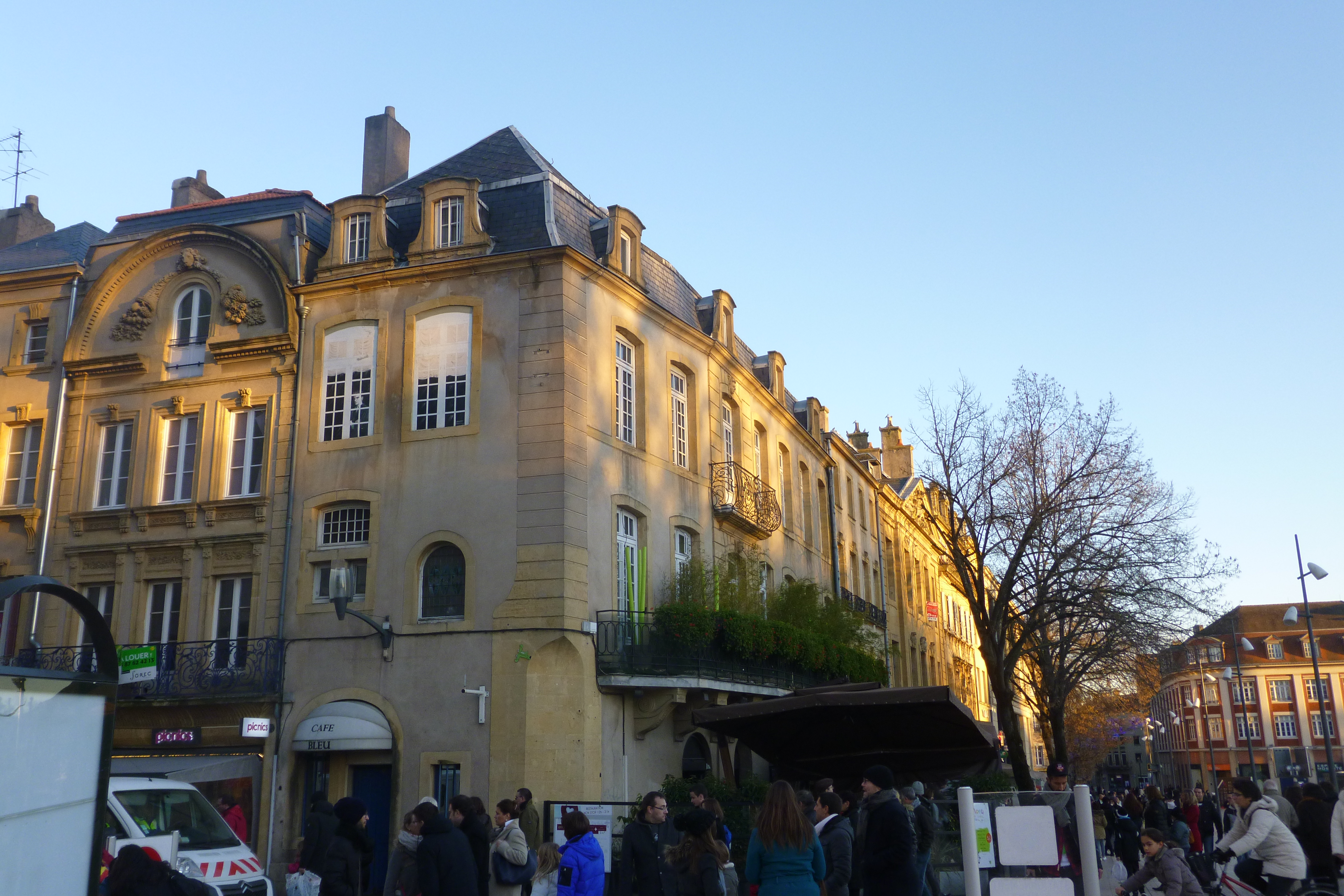 Angle nord de la place de la république, Metz (Lorraine).